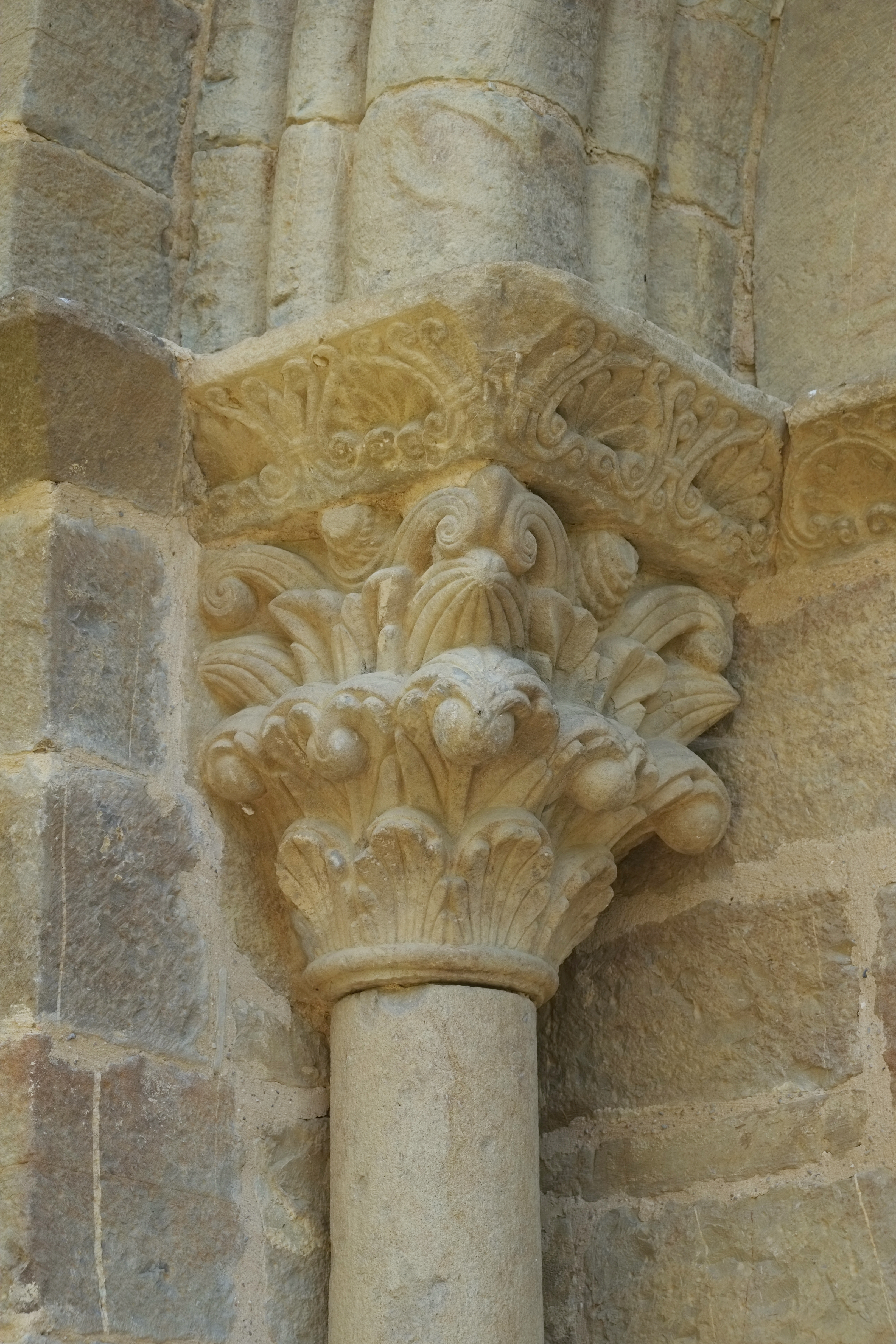 Ehemalige Klosterkirche San Adrián de Sasabe in Borau in der Provinz Huesca in Aragonien (Spanien)